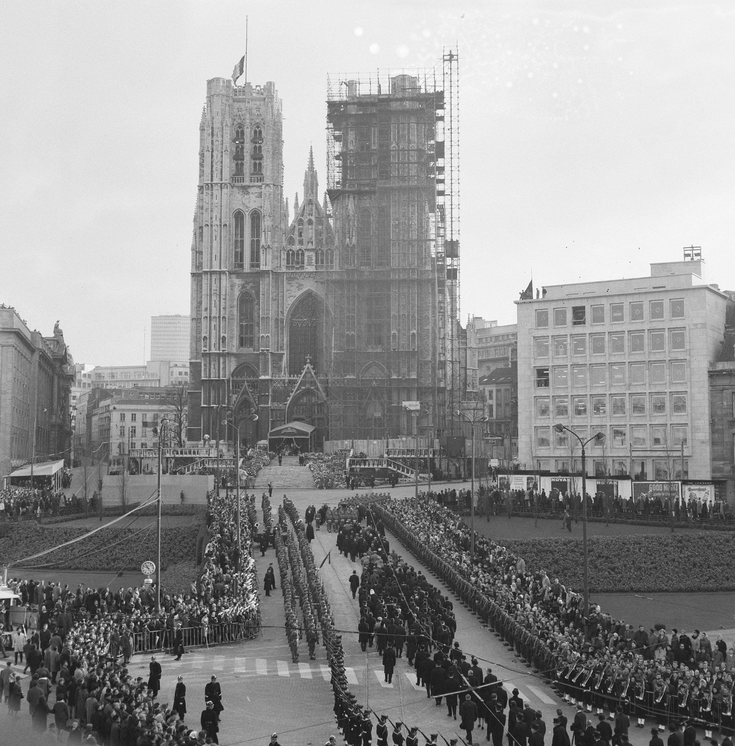 Collectie / Archief : Fotocollectie Anefo Reportage / Serie : [ onbekend ] Beschrijving : Begrafenis van Koningin Elizabeth van België te Brussel; begrafenisstoet bij het vertrek vanaf de Kathedraal van Sint Michiel en Sint Goedele Datum : 30 november 1965 Locatie : België, België, Brussel Trefwoorden : begrafenissen, kathedralen, plechtigheden, publiek, vorstenhuizen Persoonsnaam : Elizabeth, koningin van België Fotograaf : Nijs, Jac. de / Anefo Auteursrechthebbende : Nationaal Archief Materiaalsoort : Negatief (zwart/wit) Nummer archiefinventaris : bekijk toegang 2.24.01.03 Bestanddeelnummer : 918-5104